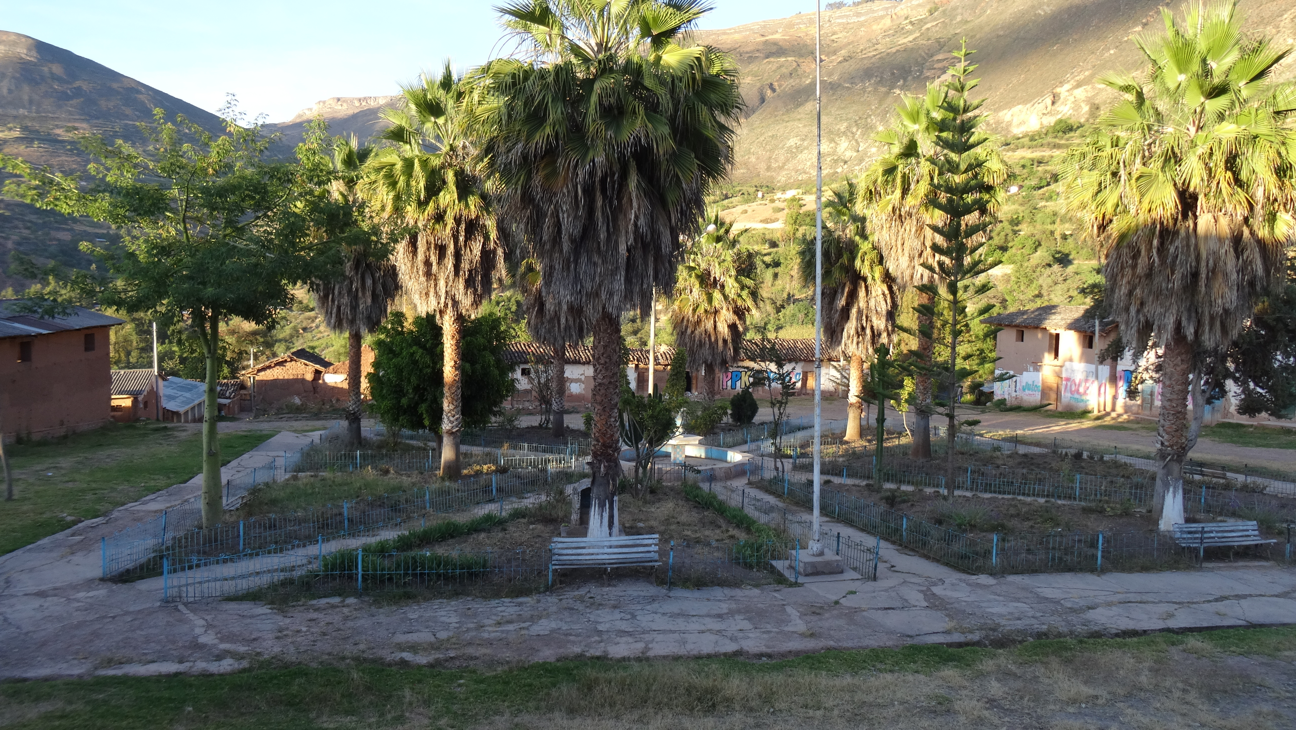 Plaza de Armas del pueblo de Aczo.